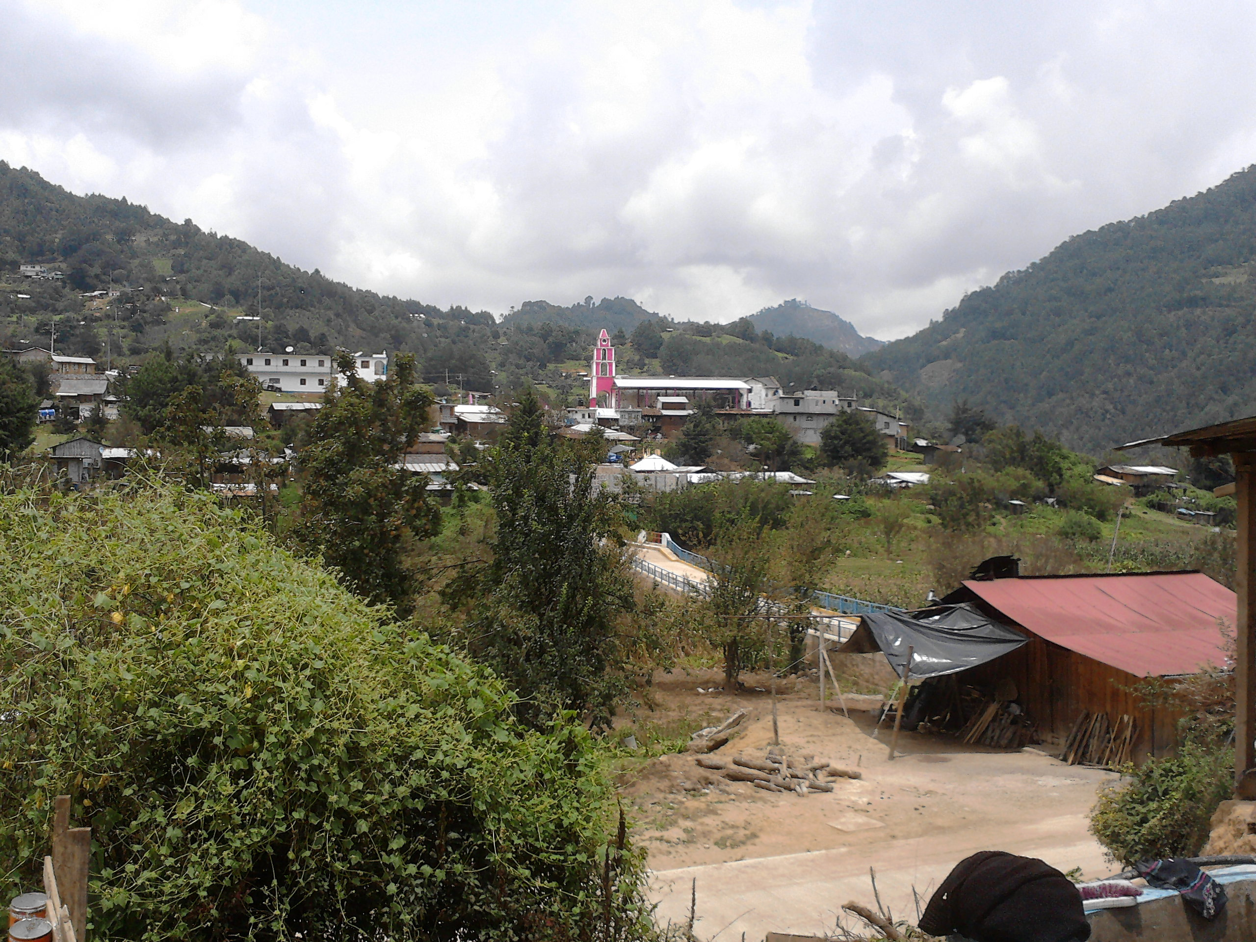 paisajes de Xoxocotla Ver